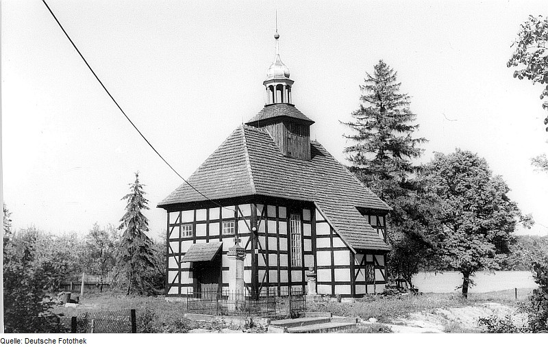 Original image description from the Deutsche Fotothek Krauschwitz-Pechern. Kirche